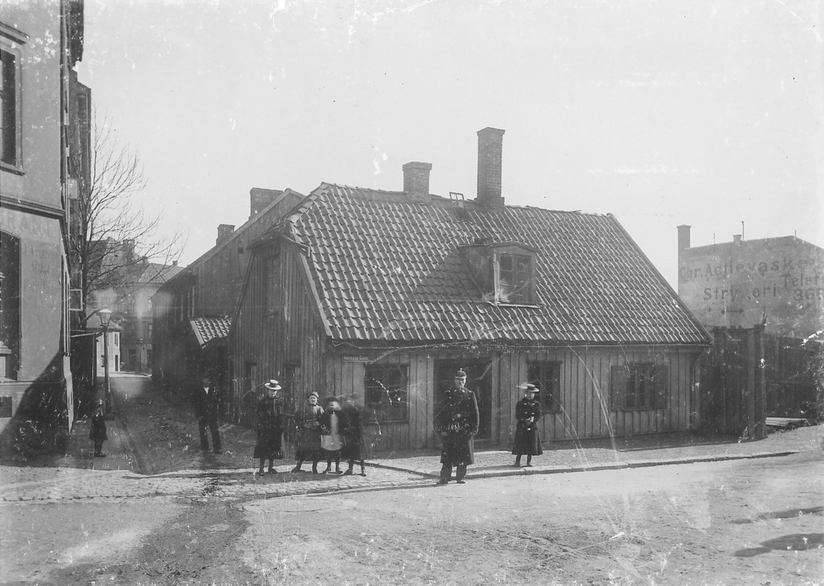 Skolestredet 3-7, avbildet før det ble revet i 1899 Foto: Ukjent / Oslo Museum